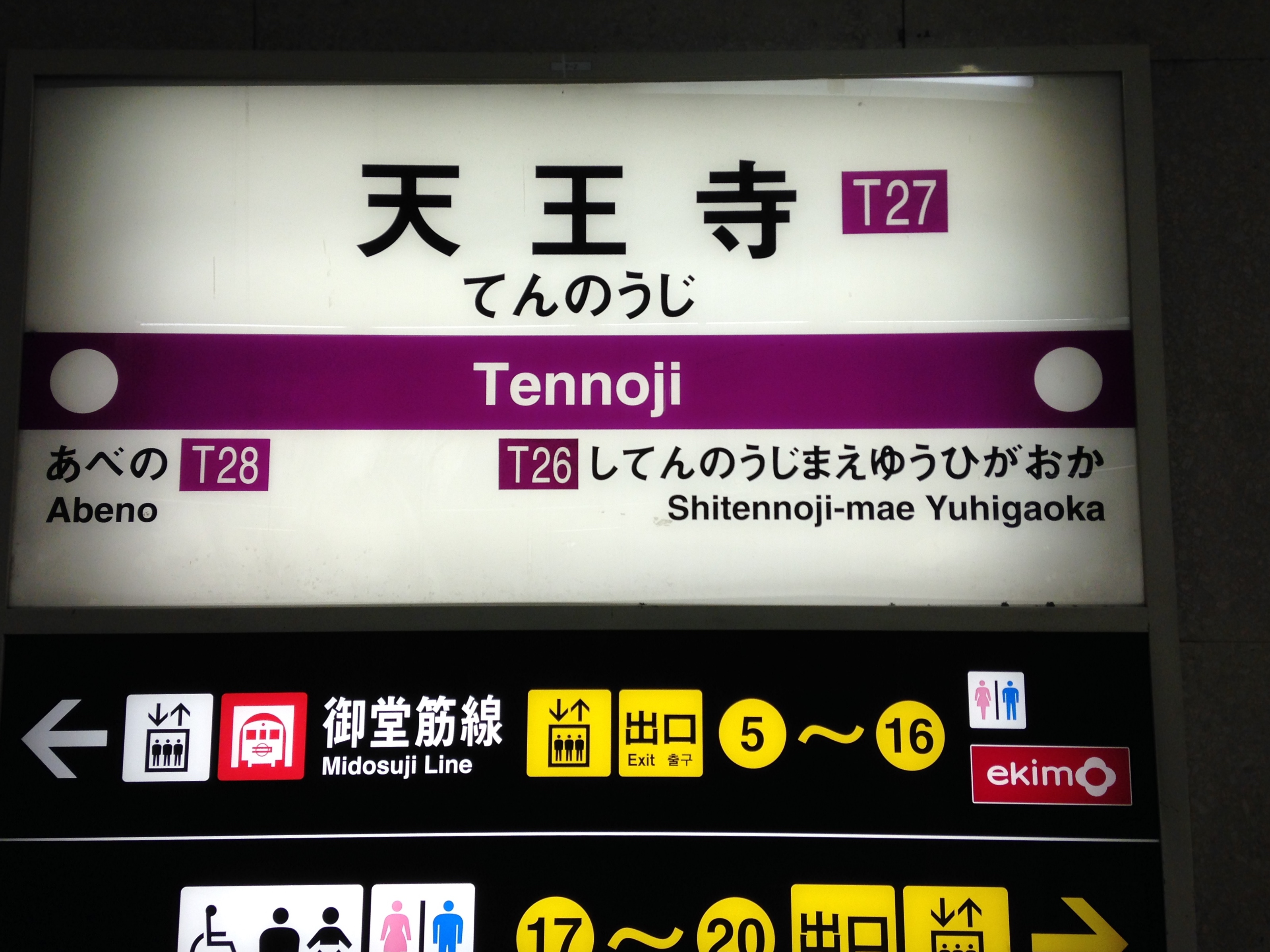 天王寺駅(大阪市営地下鉄谷町線)の駅名標